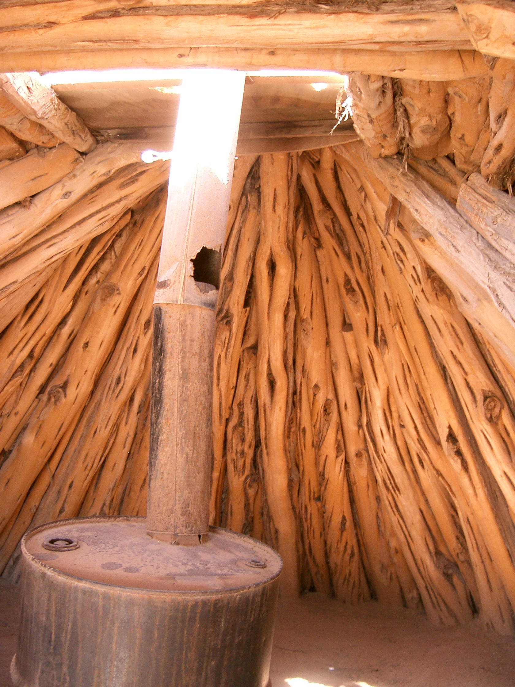 Intérieur d'un hogan, la maison traditionnelle des Indiens Navajos. Reconstruction moderne pour touristes (musée en plein air). Inside a hogan, a traditional house of the Navajo Indians. Modern reconstruction for tourists (outdoor museum).